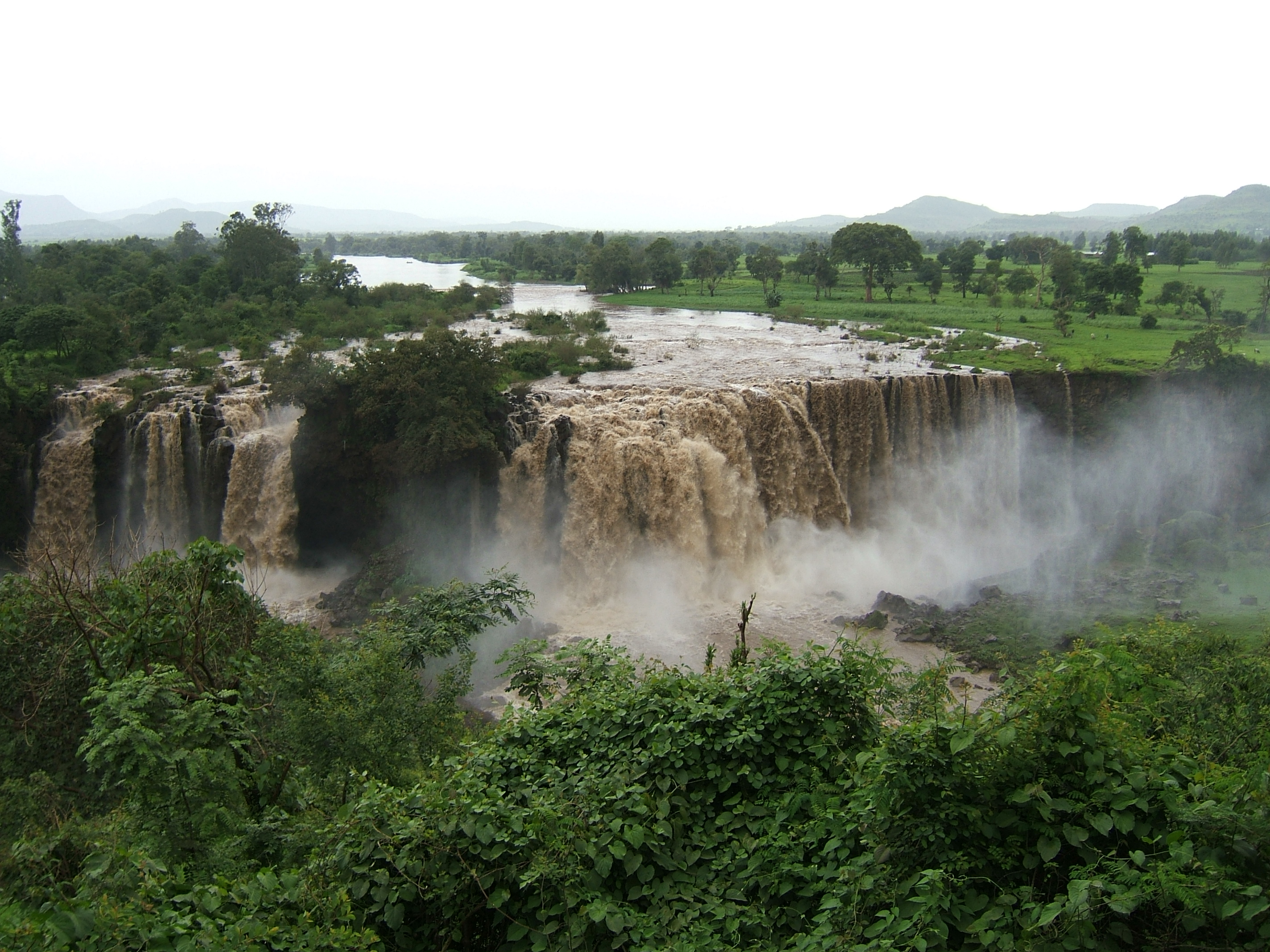 Blue Nile Falls